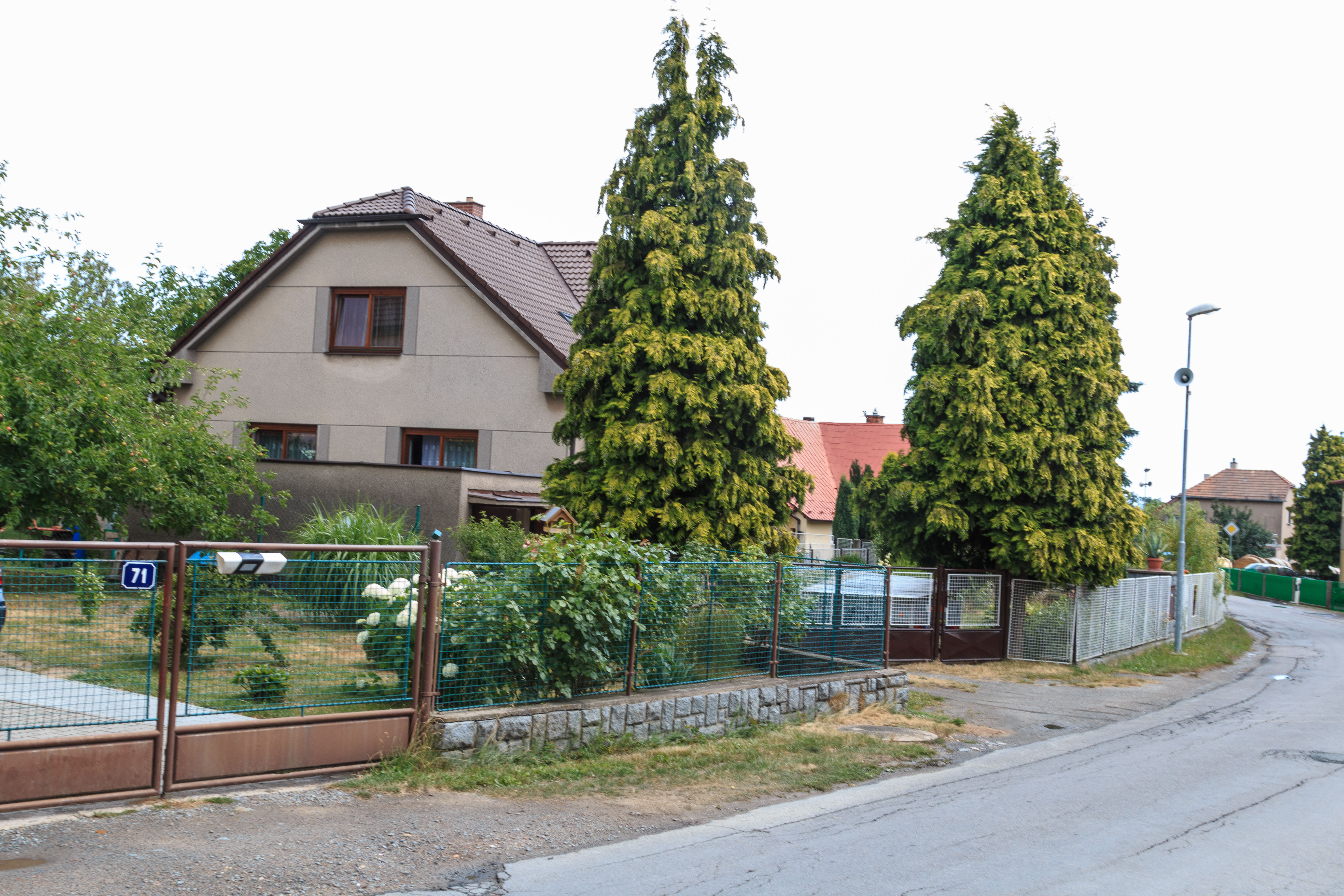 Klínek čp. 71